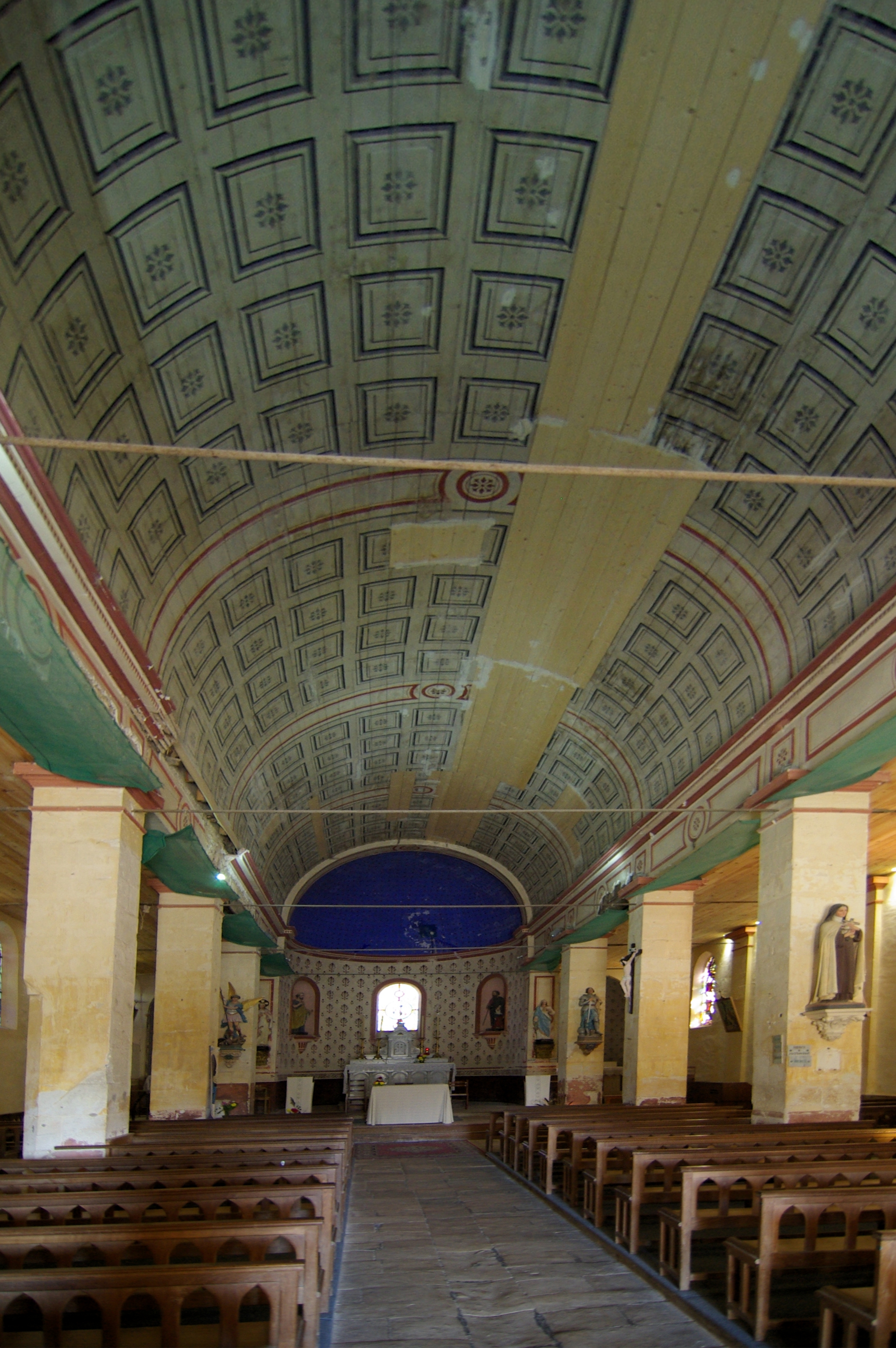 Église Saint-Guy de Damvix (Inscrit) .